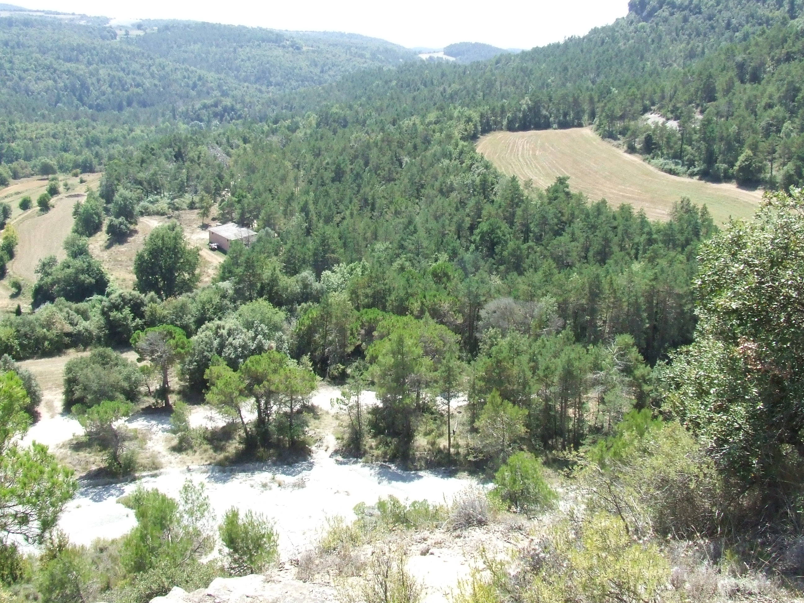 Revolt Ample (Castellcir, Moianès)